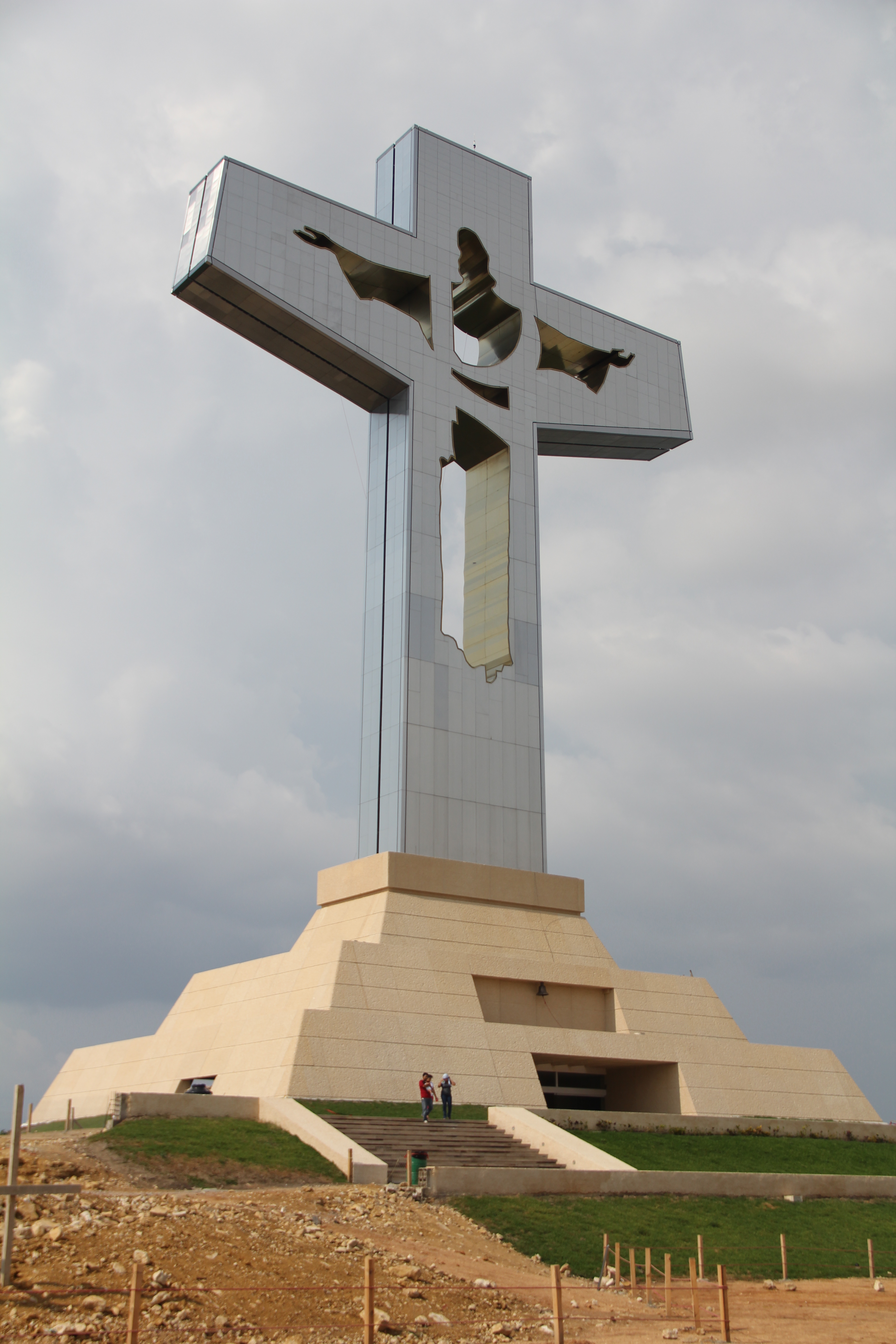 Cristo de Copoya